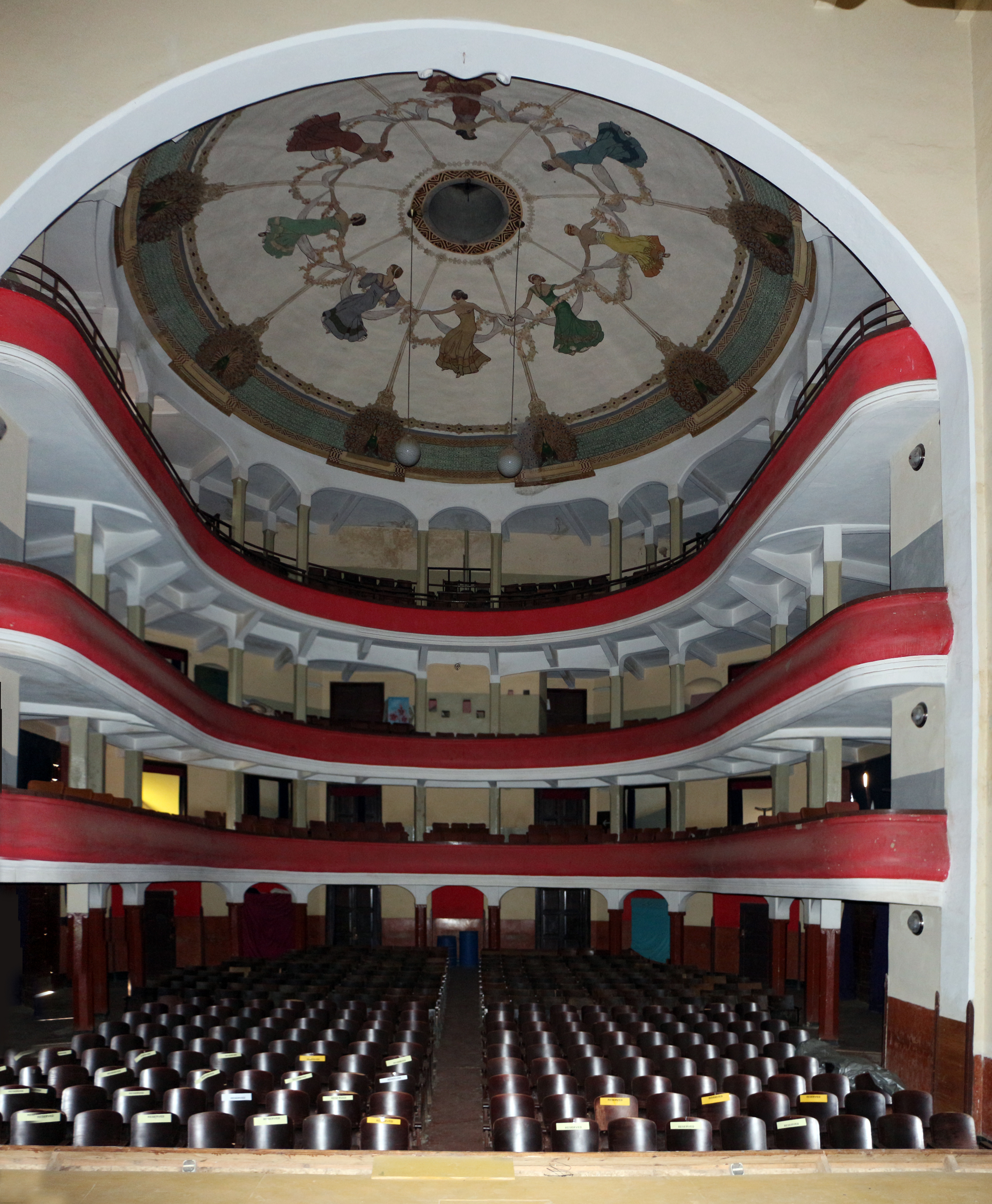 Asmara, teatro d'opera, sala 06.jpg